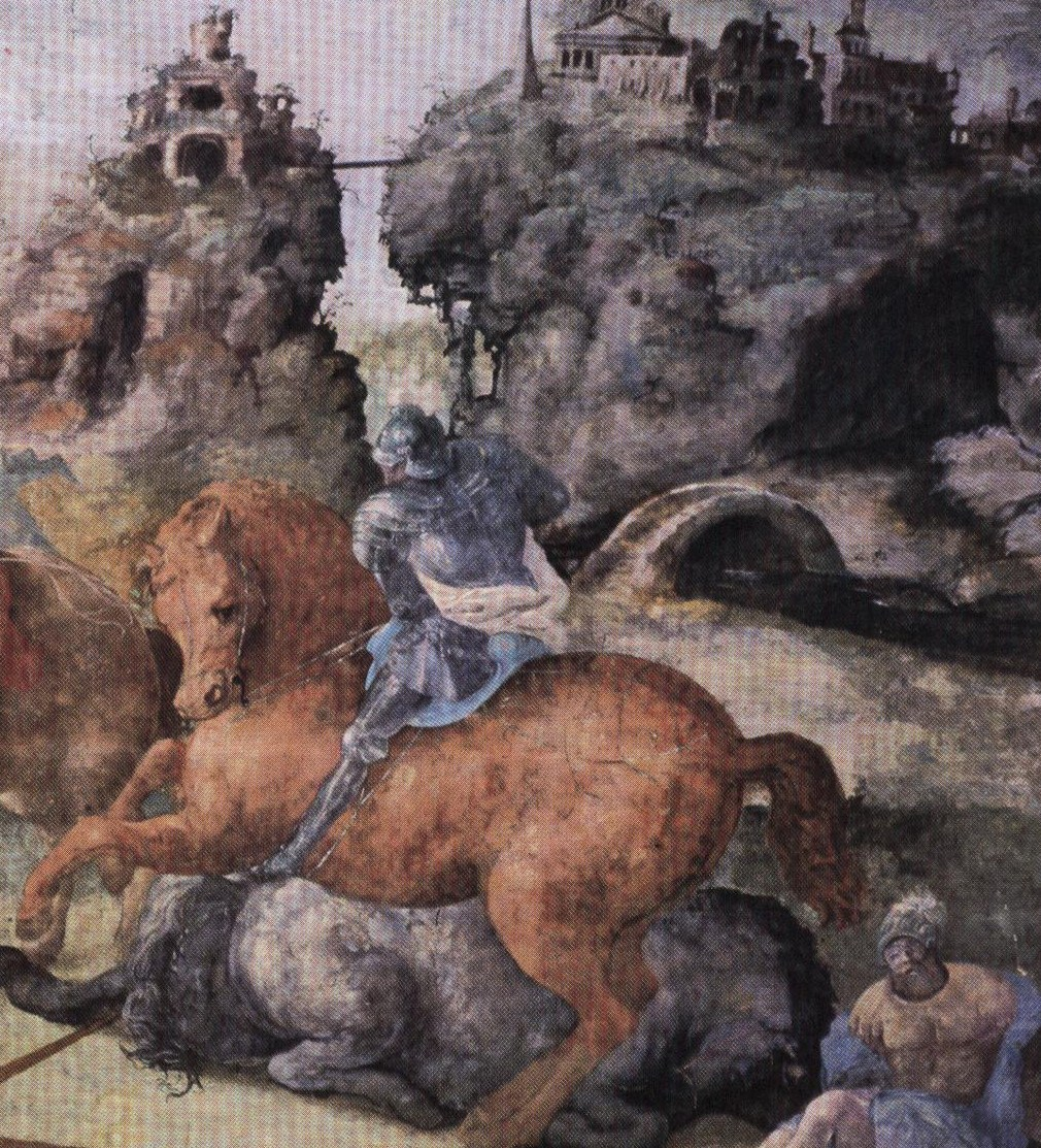 château d'Oiron_paint par Noel_Jallier_thème : mort_d'Hector